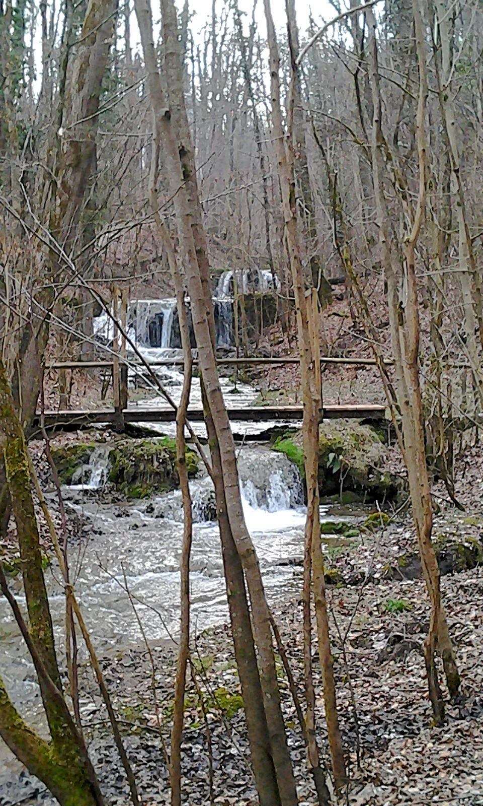 Der Pontlach-Bach im Stadtgebiet von Tittmoning, Landkreis Traunstein, Oberbayern.